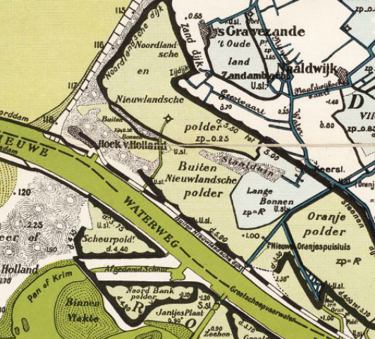 Buiten-Nieuwlandsepolder